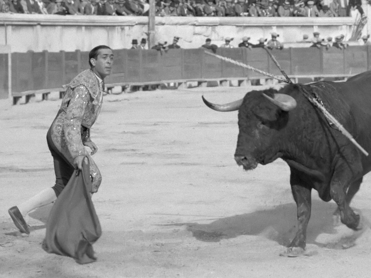 Stierengevecht in de Arena van Nîmes. Matador Marcial Lalande bevecht stier 1 september 1935